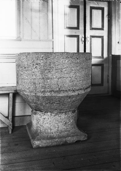 Dopfunt, kalksten, 1200-talet. Snabbinv. Kategori: (04) DopfuntarDopfunt, kalksten, 1200-talet. Snabbinv.